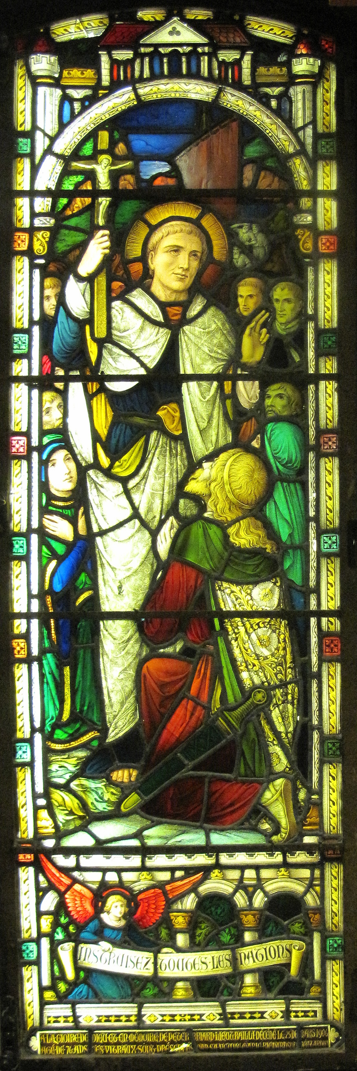 Nrf: Vèrrinne au Musée d'Jèrri tchi soulait êt' à la Chapelle ès Pêtcheurs - Henry Thomas Bosdet